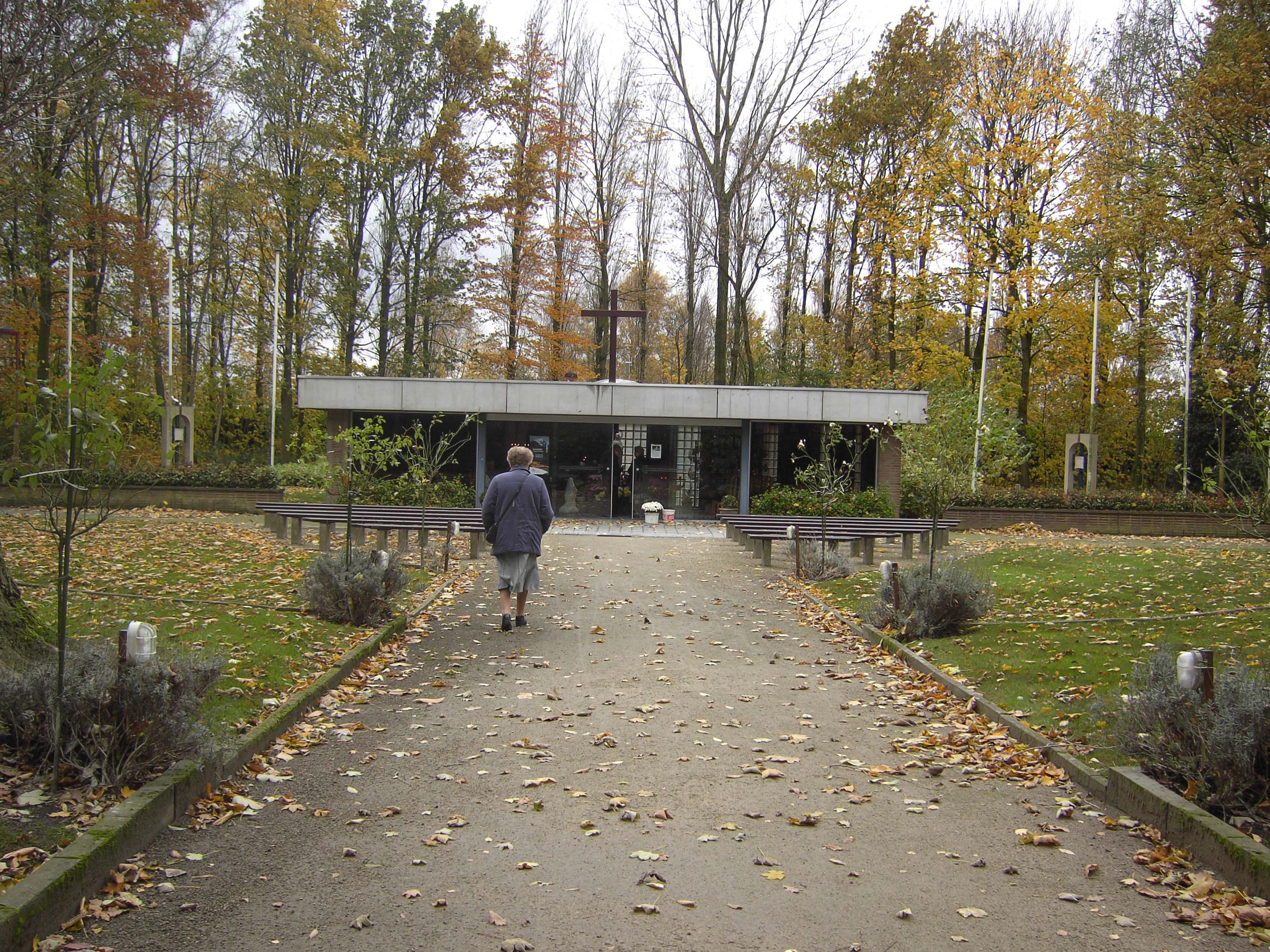 Grot van Bachte - Bachte Maria Leerne - Deinze - Oost-Vlaanderen - België